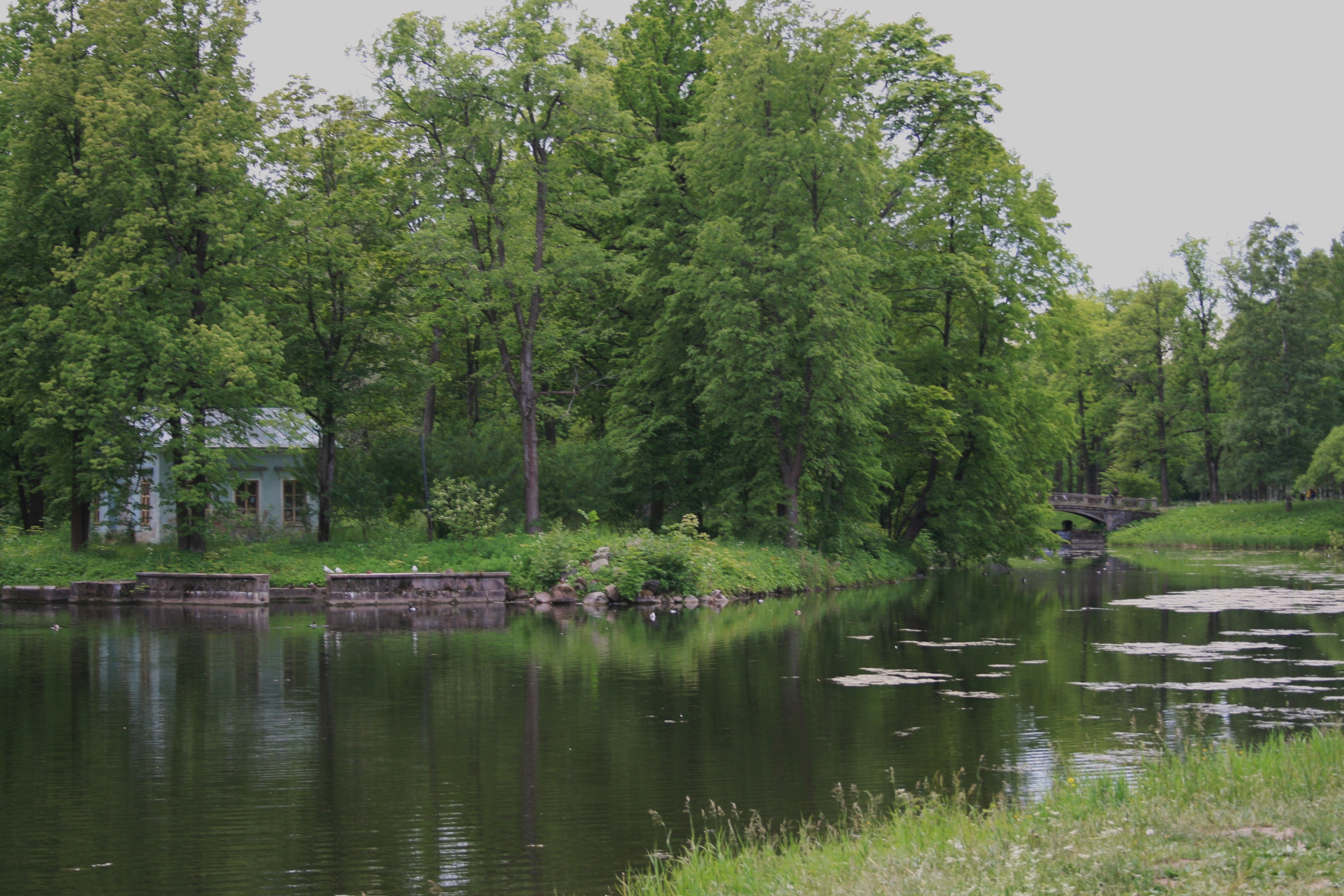 Детский домик в Александровском саду Царского села